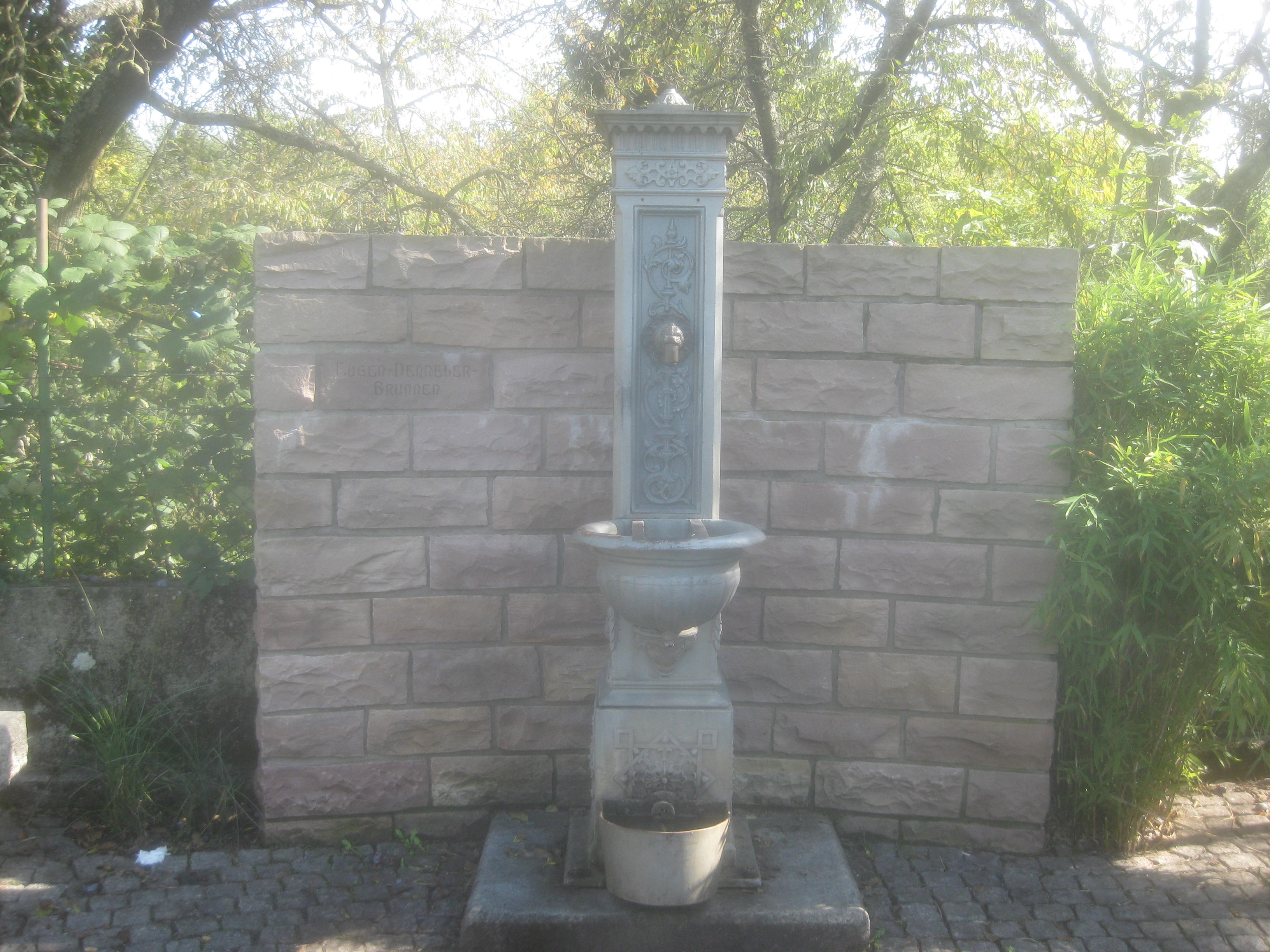 Eugen-Denneler-Brunnen am westlichen Anfang des Rennwegs auf der Wangener Höhe in Stuttgart-Wangen. Der frühere Waldstücklesbrunnen wurde 2014 zu Ehren von Eugen Denneler, dem Initiator der Wasserversorgung auf der Wangener Höhe, in Eugen-Denneler-Brunnen umbenannt. Einer von 16 gusseisernen Brunnen ähnlicher Bauart in Stuttgart. Der Brunnenstock ist als Vierecksäule mit ornamentalen Reliefs ausgebildet, an der der Wasserhahn und der waschbeckenartige Trog befestigt sind.